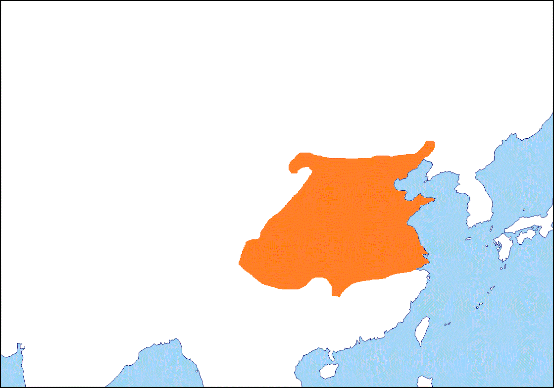 Mapa sintetico de la distribución geográfica de la Dinastia Zhou